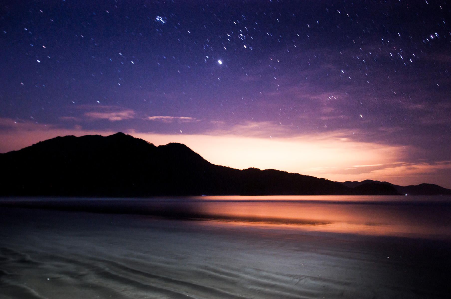 Vista_a_partir_de_Dois_Rios